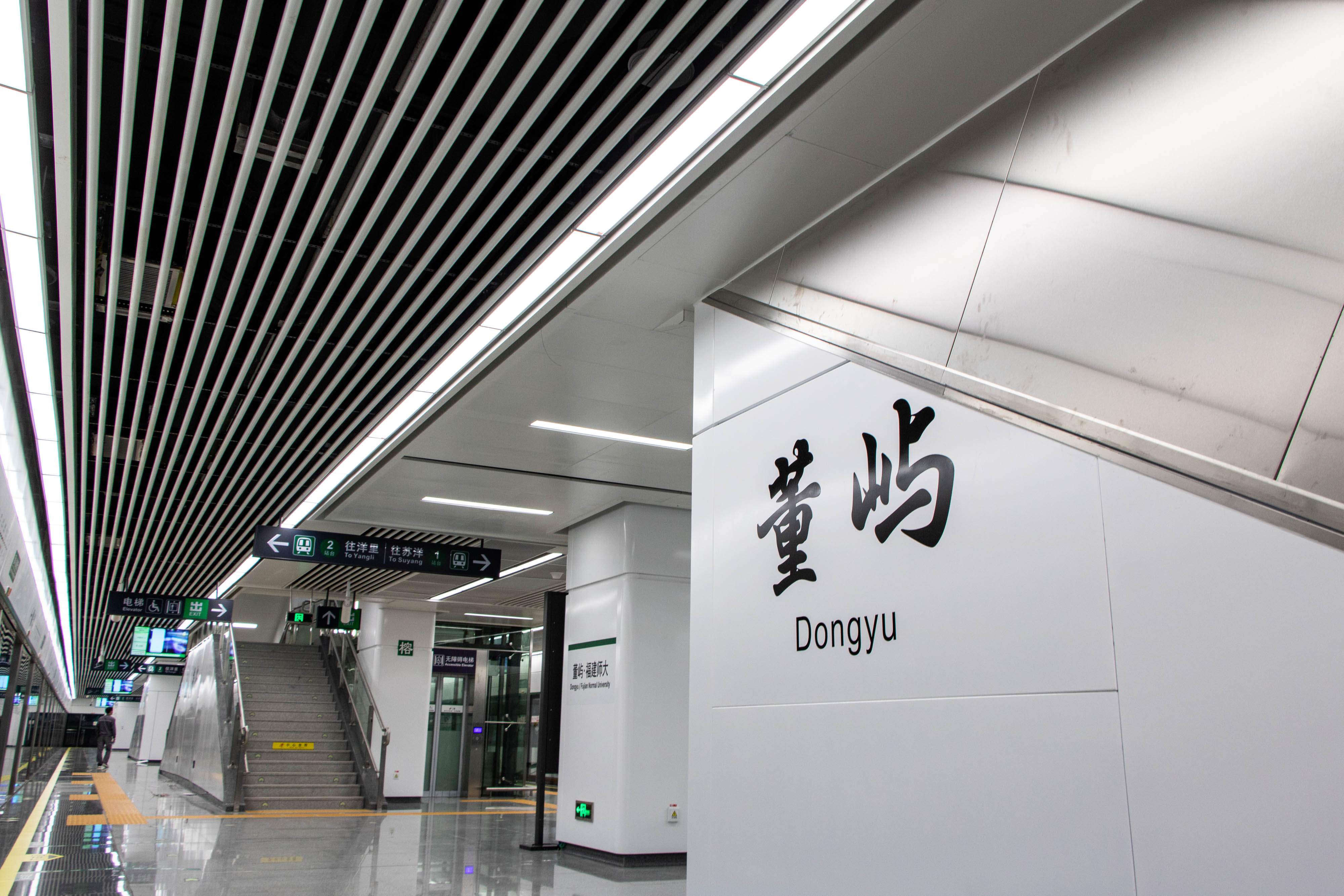 中文（中国大陆）: 董屿站站台与站名壁